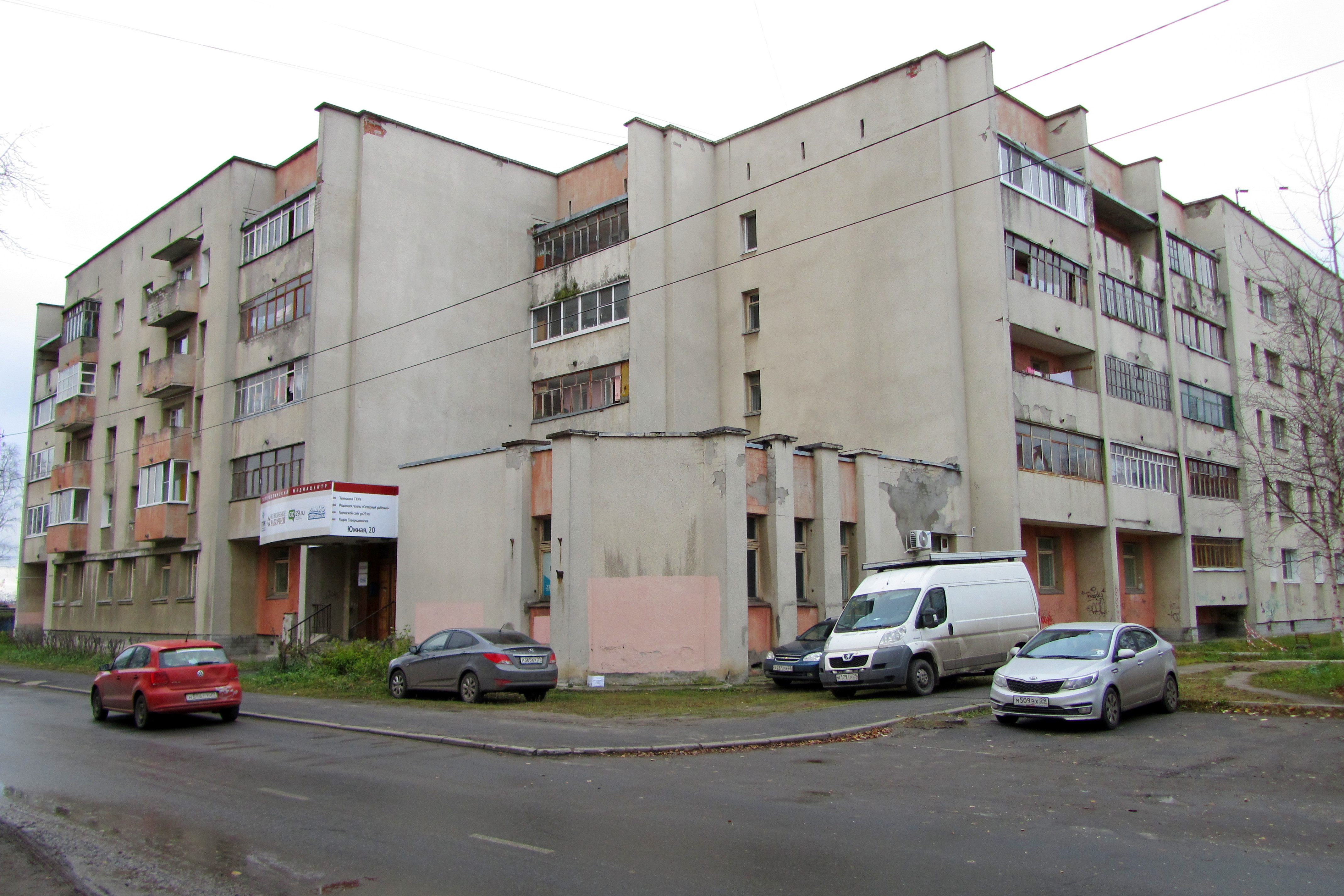 Дом № 20. Улица Южная, Северодвинск. Редакция газеты Северный рабочий. Фото А. Щекинова